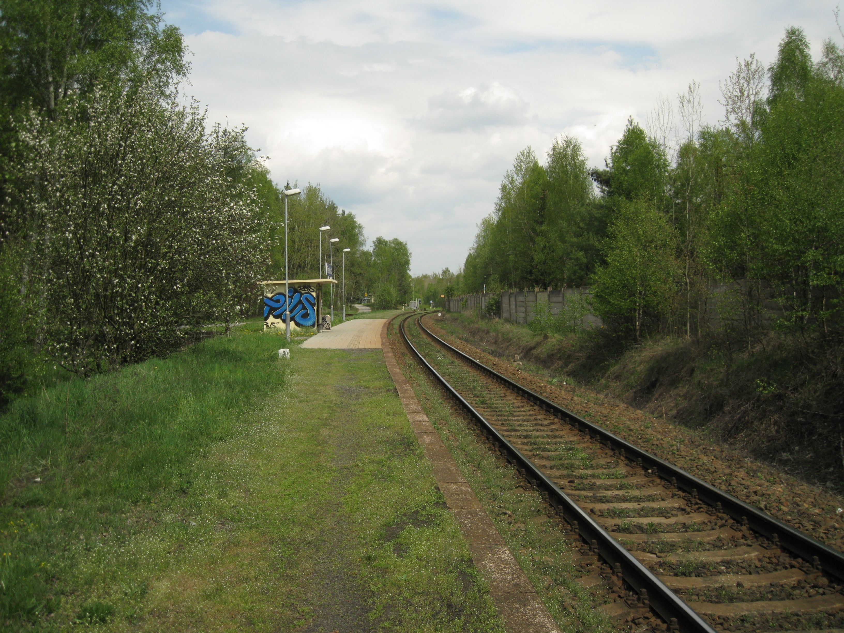 Pohled na železniční zastávku Třemošná u Plzně zastávka od jihu.